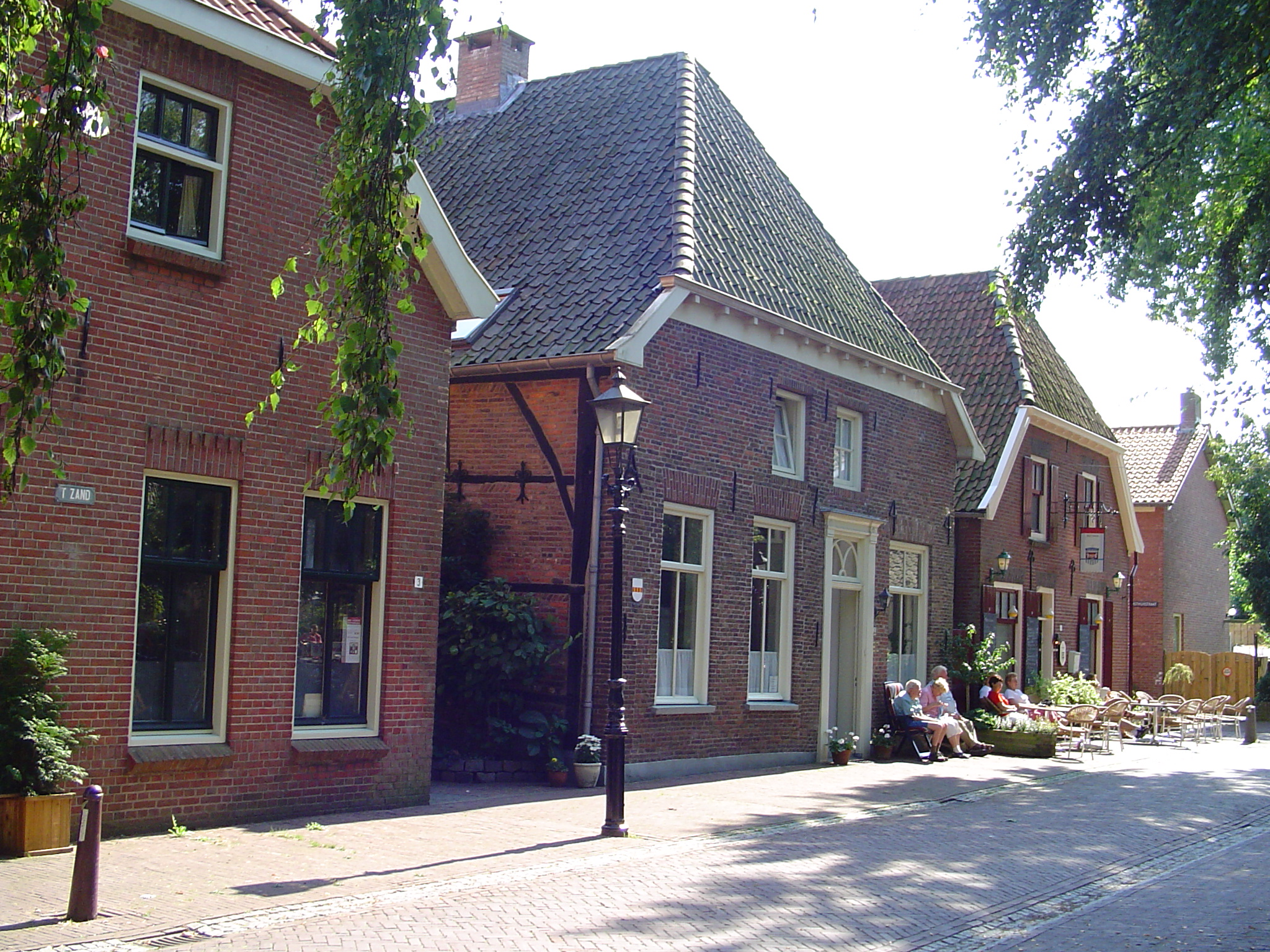 't Zand 2 te Bredevoort (middelste huis)